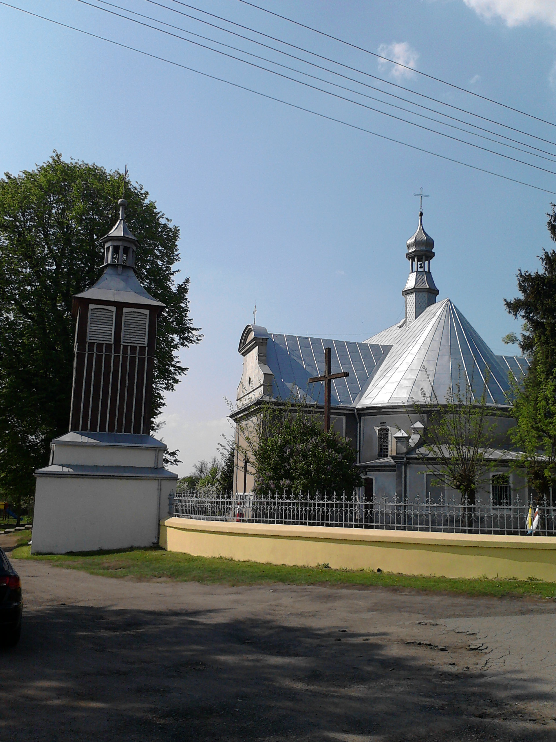 Kościół parafialny w Moszczenicy